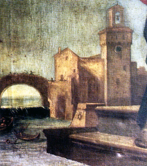 Particoare della Rocca Piccola con la Torre dei Modenesi di Finale Emilia, nell'opera San Nicola con la Vergine col Bambino e Sant’Anna di Antonio Consetti